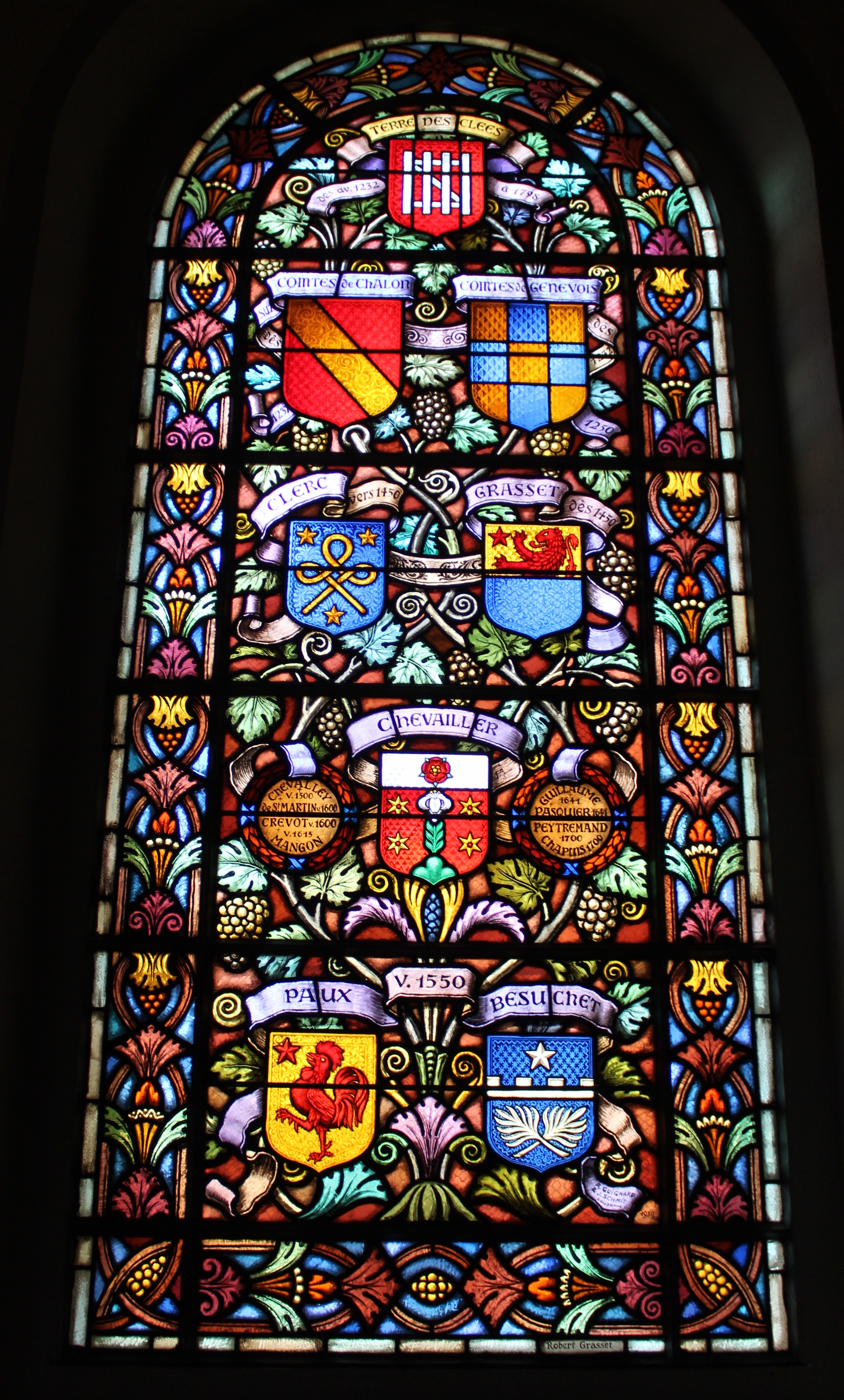 Vitrail du temple